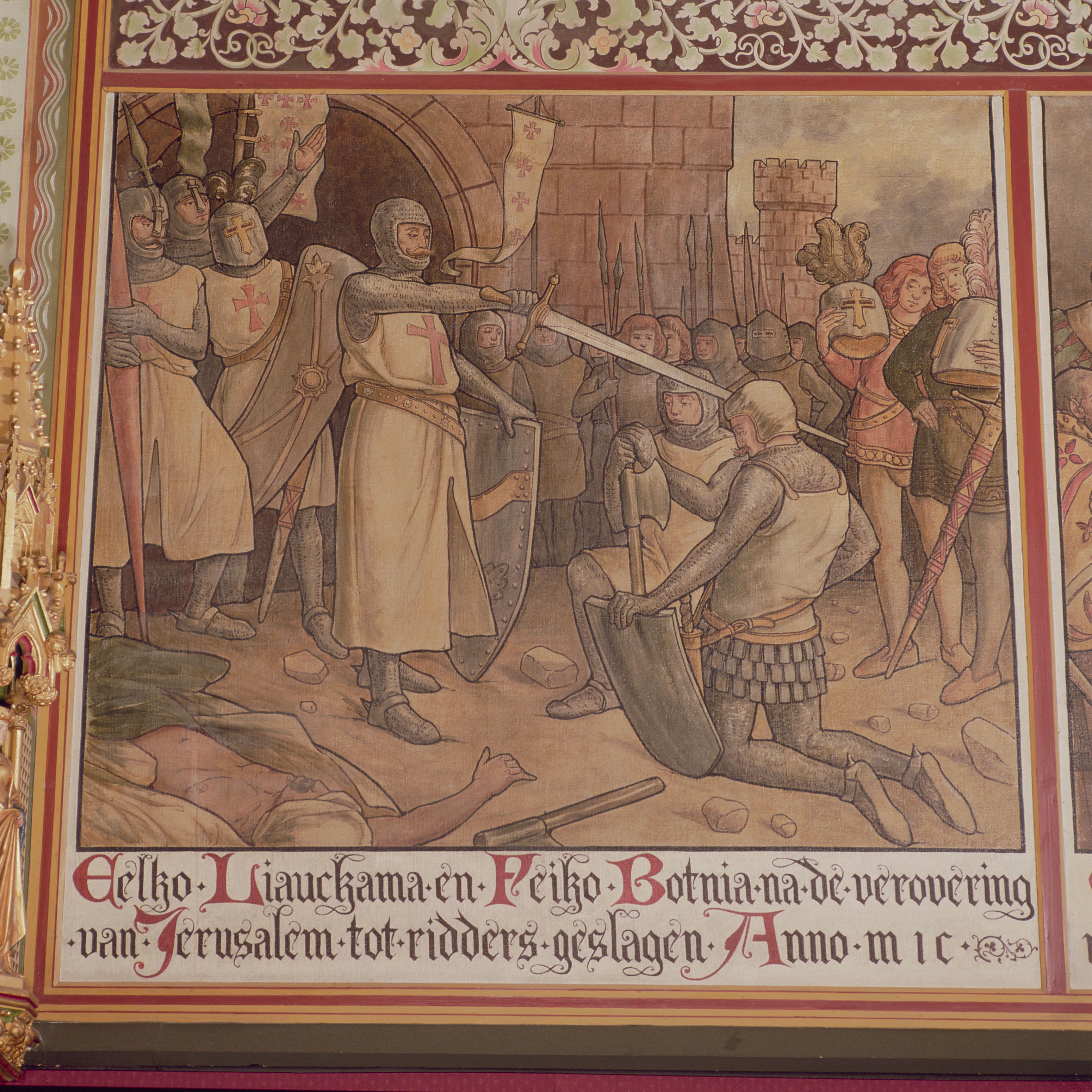 Provinciehuis: Interieur, begane grond, achterzijde (Statenzaal), muurschildering, Eelko Liauckama en Feiko Botnia na de verovering van Jerusalem tot ridders geslagen (opmerking: Inventarisatie Decoratieve Interieurschilderingen in Nederland (1600-1940), i.s.m. RKD)